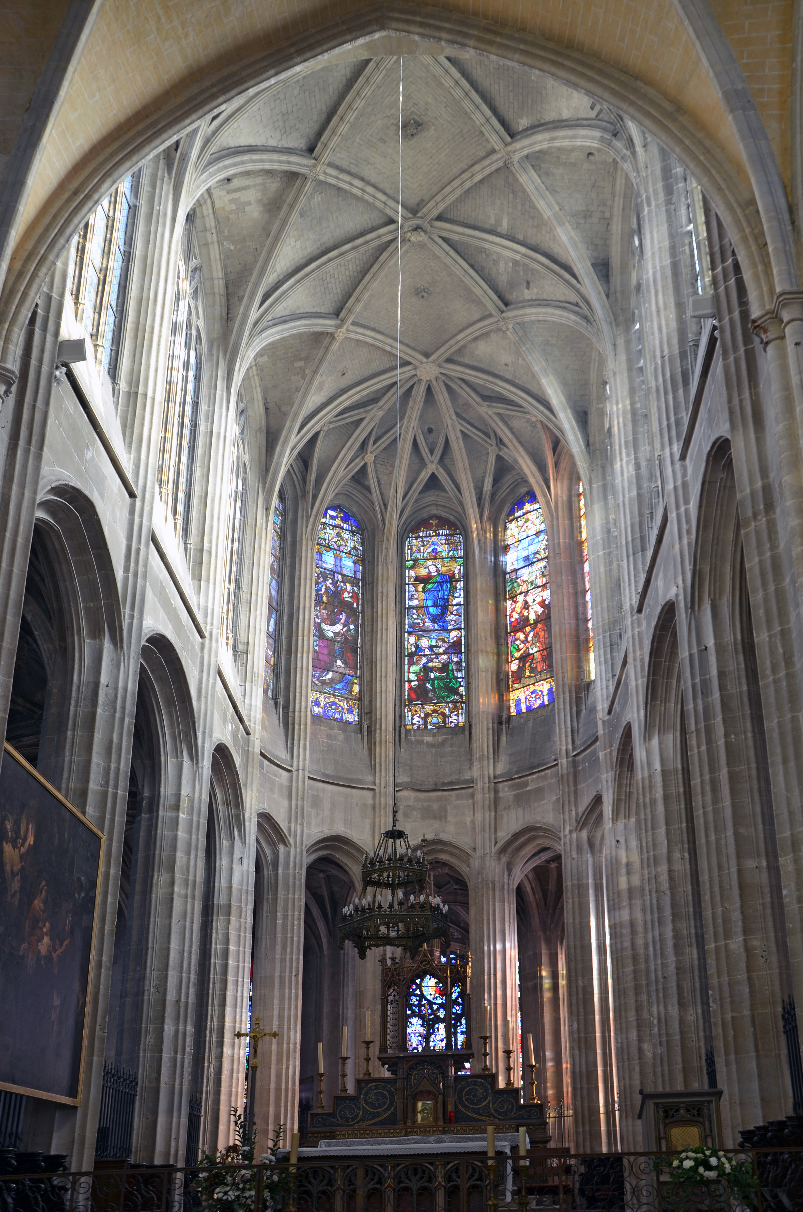 Église Saint-Antoine à Compiègne, Oise, Picardie, France